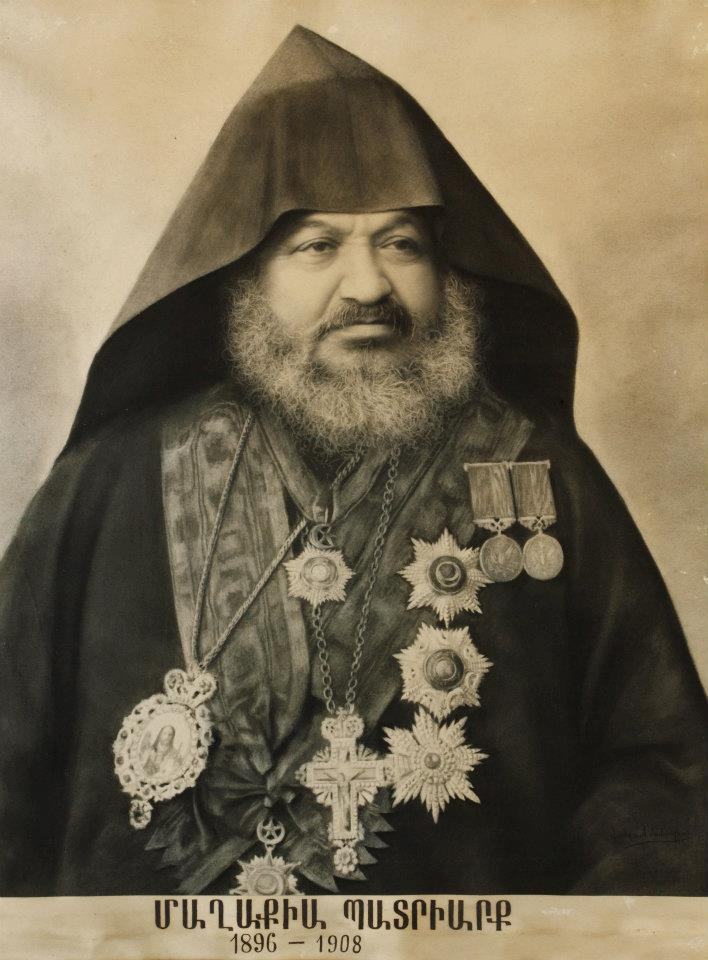 Армянский религиозный деятель и ученый Магакия Орманян